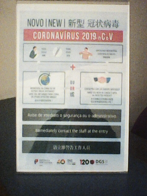 Cartaz de aviso sobre o 2019-nCoV no Centro de Saúde de Alvalade, em Lisboa.